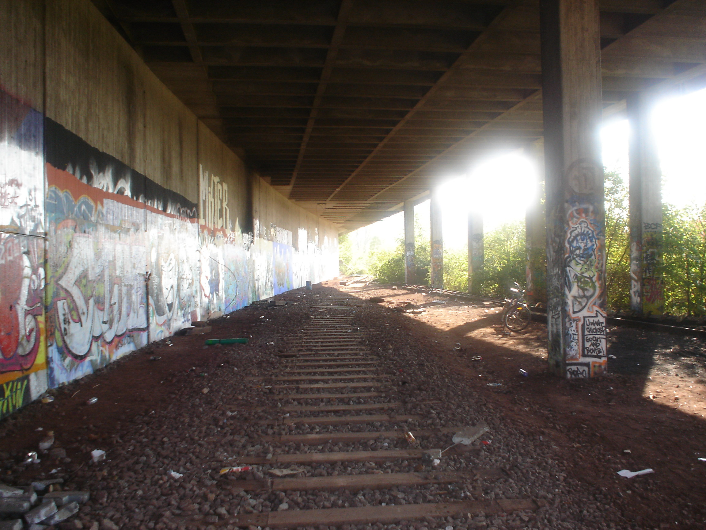 Bahnhof München Olympiastadion, Blick auf den Tunnel ohne Gleise